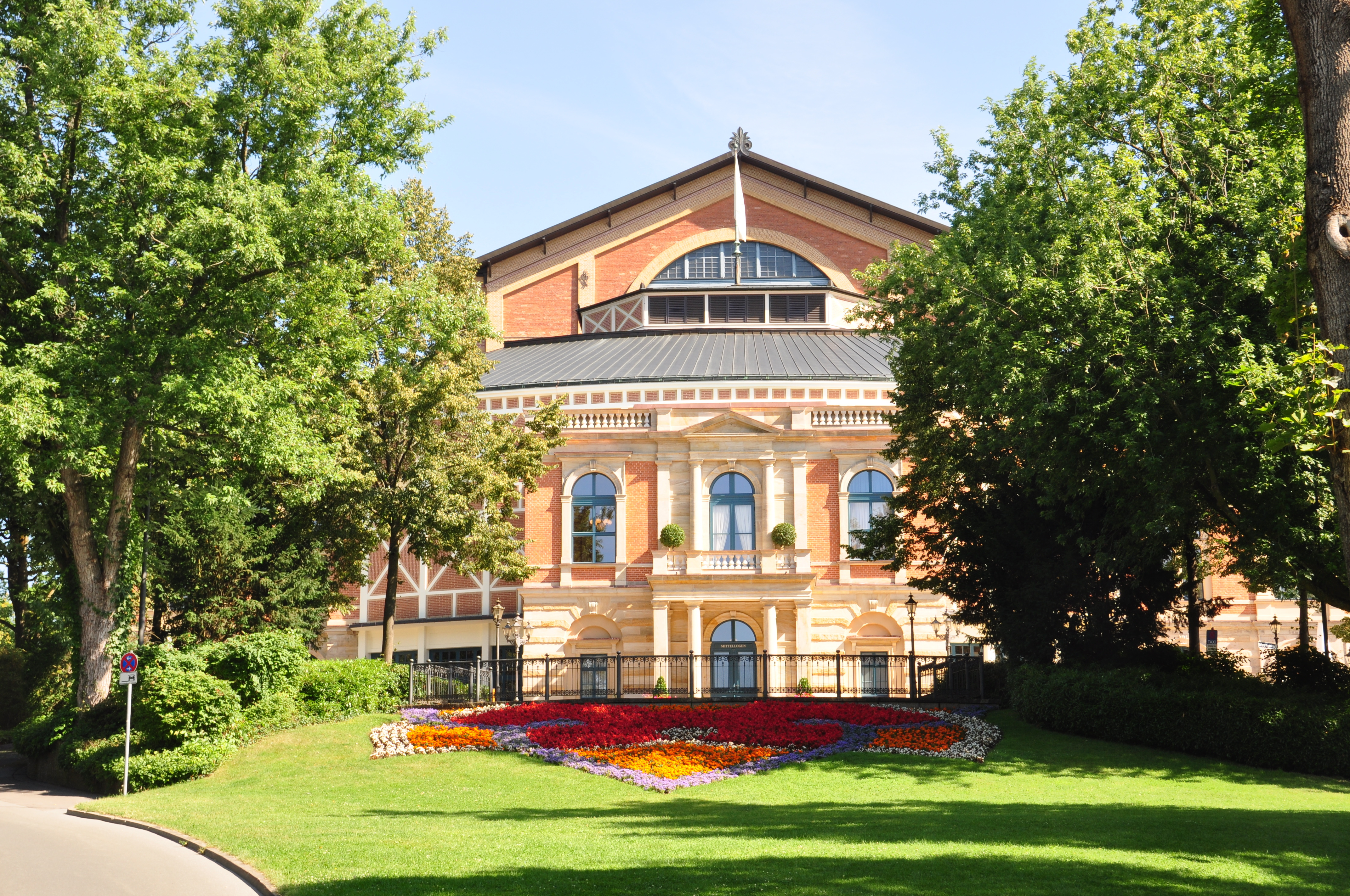 Vista del Festspielhaus de Bayreuth durante el Festival de 2016